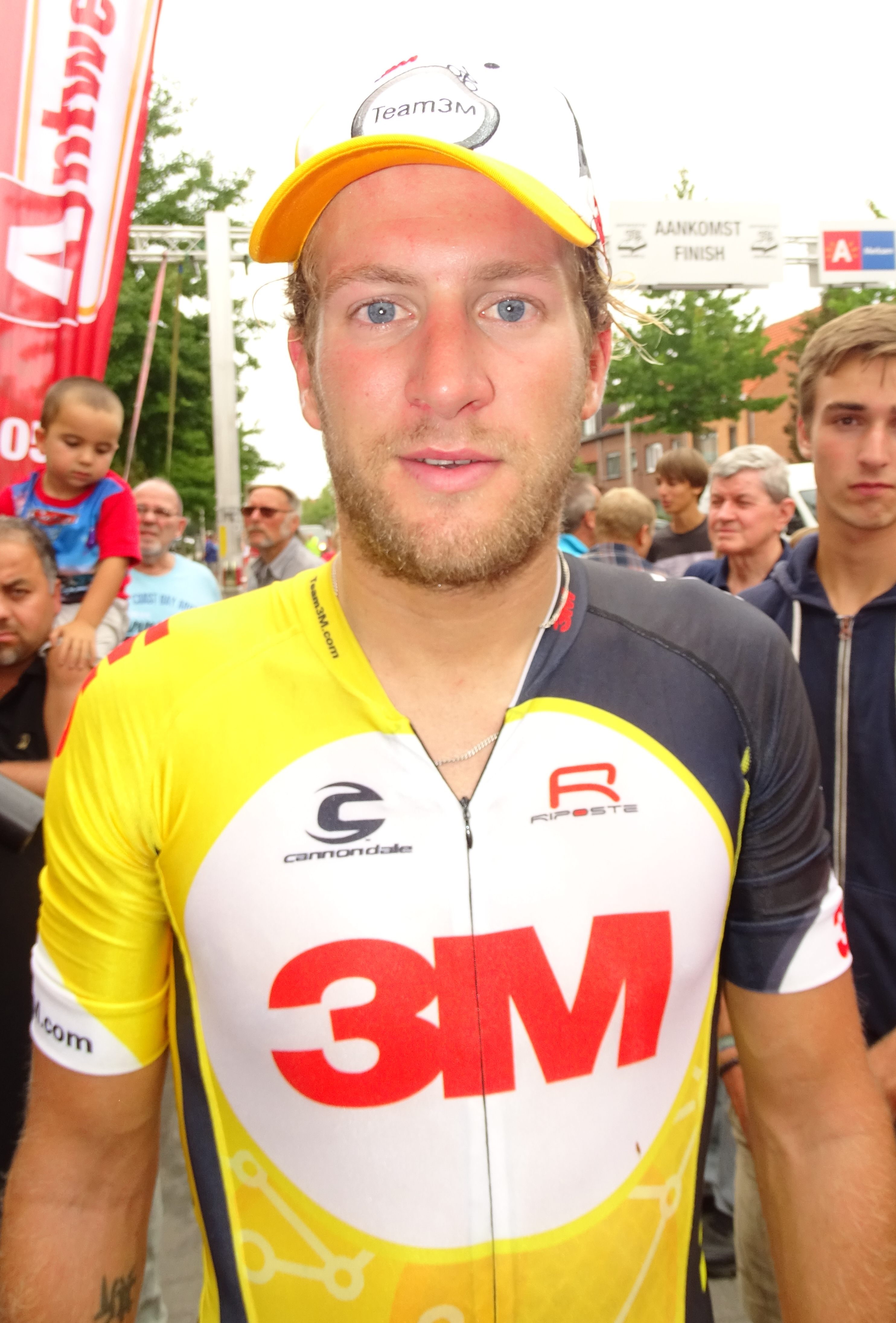 Reportage réalisé le dimanche 9 août à l'occasion de l'arrivée de la Flèche du port d'Anvers 2015 à Merksem (Anvers), Belgique.